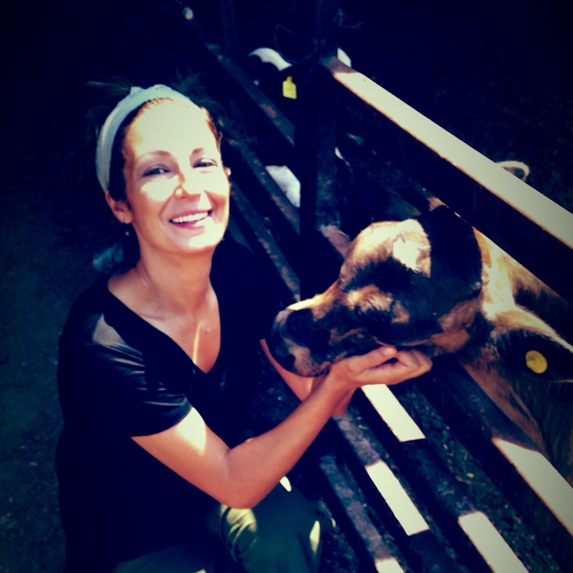 Yağmur Özgür Güven, hayvan hakları savunucusu